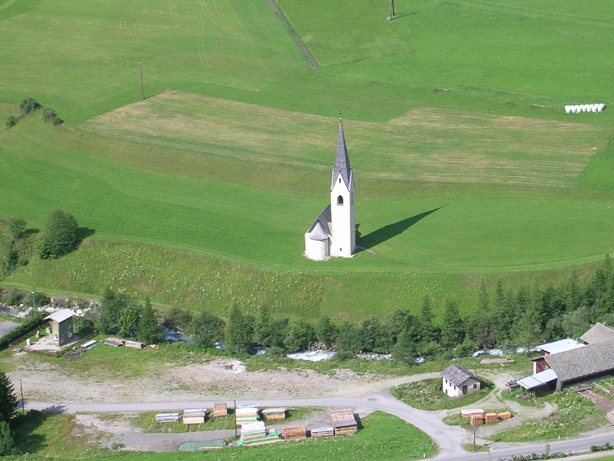 River Kalserbach with Church St. Georg (Kals am Großglockner)